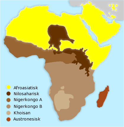 Oversikt over afrikanske språkfamiliar. Kjelde Frå en:. Biletet er laga av Mark Dingemanse (utgåven frå 18. november 2004) og omarbeidd til norsk av Ranveig. Omtale Afroasiatisk og nilosaharisk er dei einaste som er påviste språkfamiliar. I tillegg har ein Nigerkongo A og Nigerkongo B, den siste gruppa vert òg kalla Bantuspråk. I Kalahari talar ein khoisan-språk, medan gassisk er eit austronesisk språk.